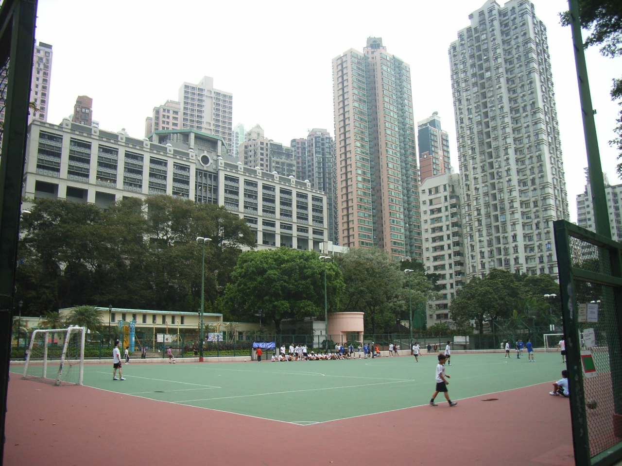 香港佐治五世紀念公園 King George V Memorial Park, Sai Ying Pun, Hong Kong